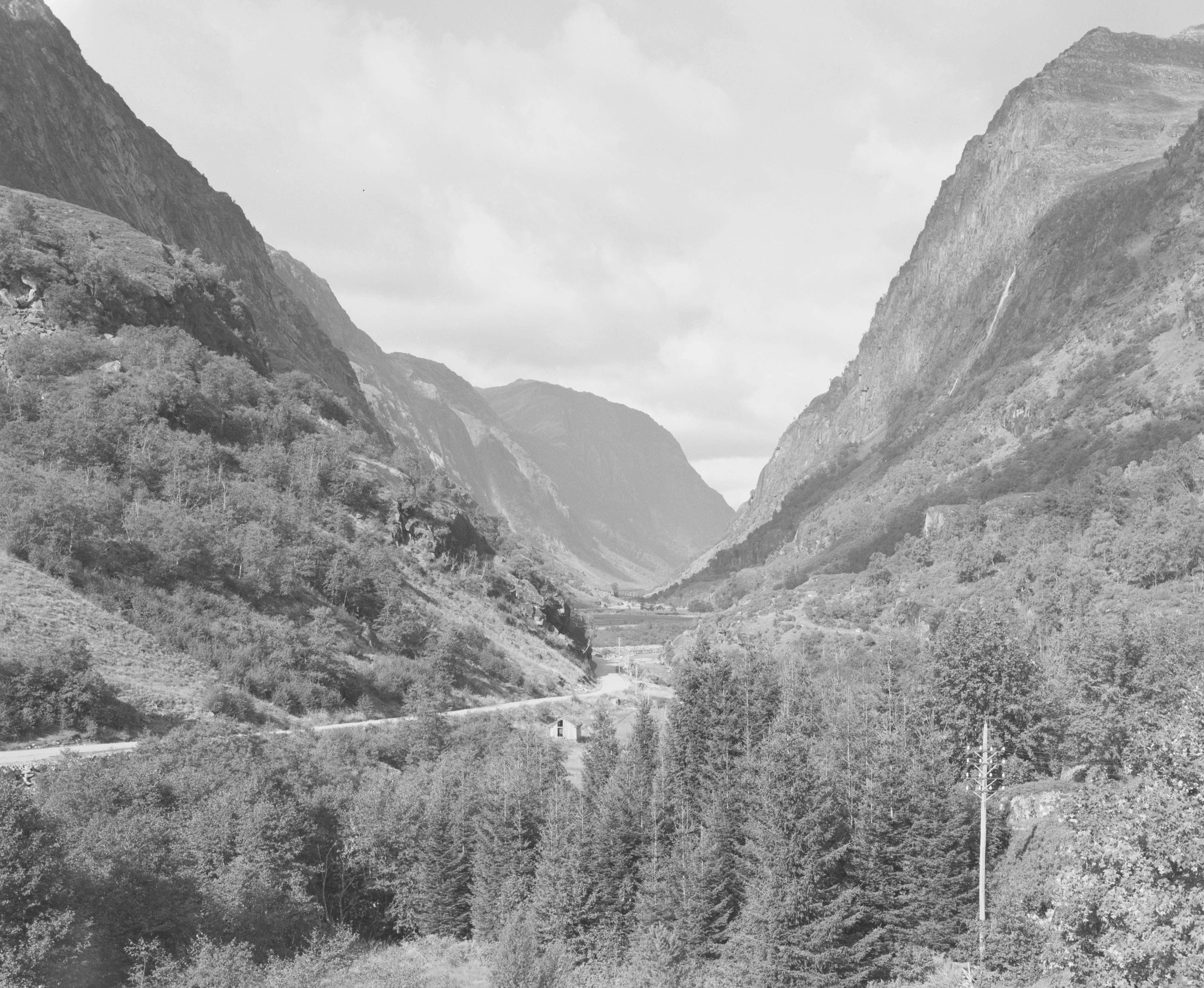 Bildet er hentet fra Nasjonalbibliotekets bildesamling Votedalen, Jølster, Sogn og Fjordane. Utsikt nordover i nærheten av Klakegg med Stardalselva såvidt synlig